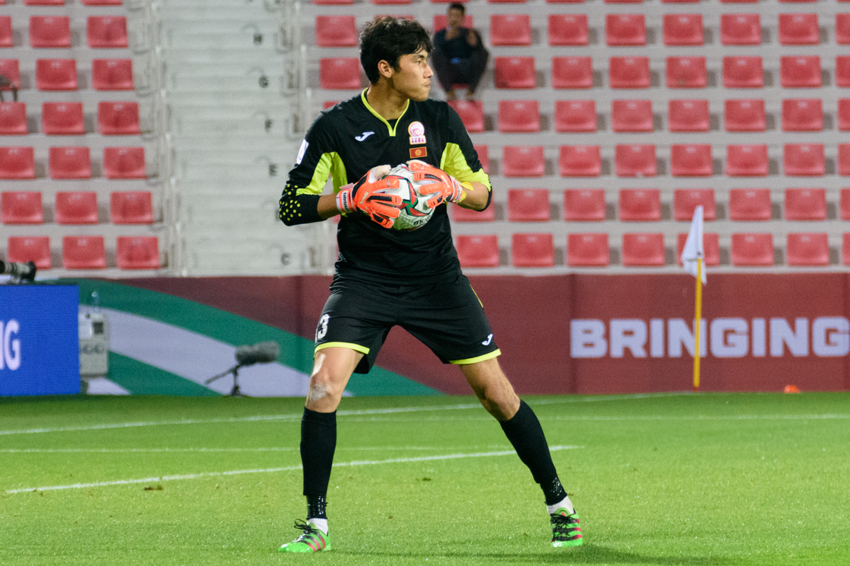 Kutman Kadyrbekov at the Asian Cup 2019